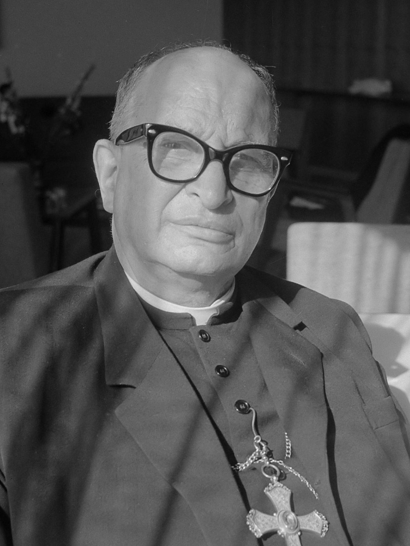 Kardinaal Jose Garibi Y Rivera op Schiphol 30 juni 1961